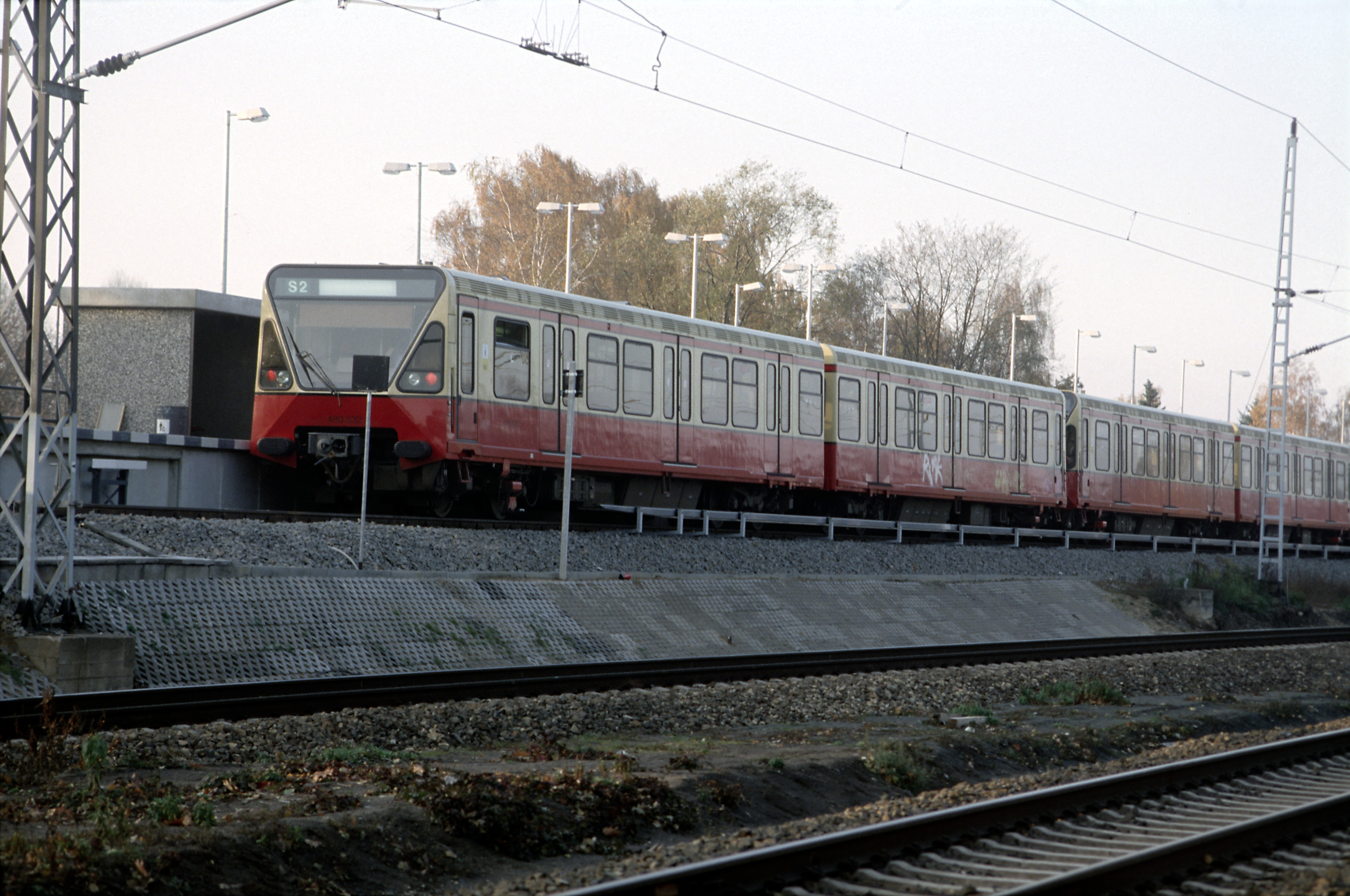 Bahnsteigstumpfgleis der S-Bahn Berlin in Blankenfelde (Kr Teltow). Die Umsteigeverhältnisse sind nicht ideal, die Verhältnisse erlauben aber mit vertretbarem Aufwand keine bessere Lösung. Das Bahnsteiggleis wurde schon vor dem Wiederaufbau der Gleichstrom-S-Bahn von den Zügen von und nach Mahlow genutzt.